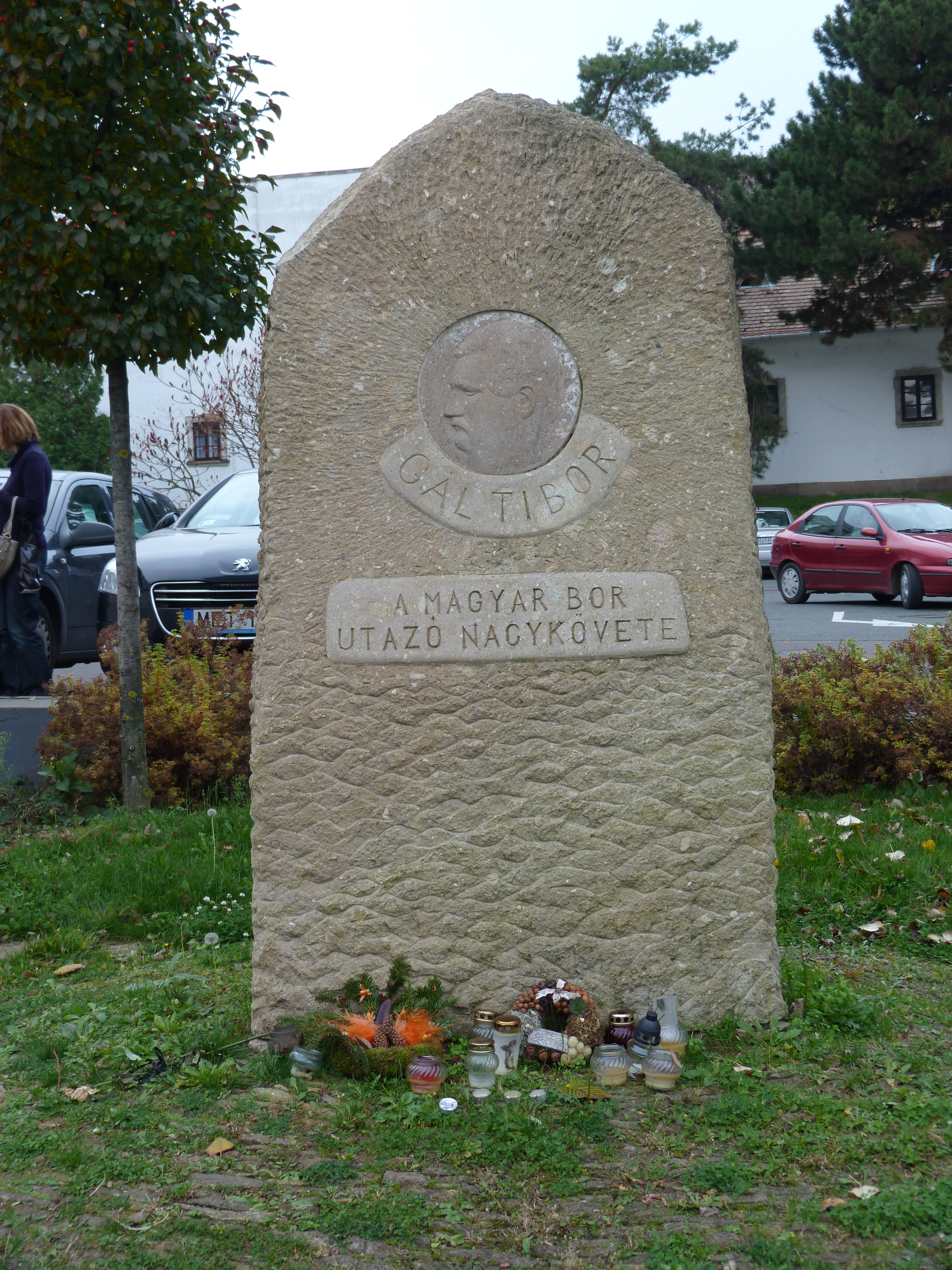 A felvétel 2013. november 20 -án készült Egerben. Gál Tíbor borász emlékműve. ©© Derzsi Elekes Andor, Budapest, 2013, You are authorised to use these photos and vids under Creative Commons – even for commercial, for profit purposes. Photos must be attributed to Derzsi Elekes Andor. All of the photos and vids in the Metapolisz DVD line are under Creative Commons and can be used even for commercial – for profit – purposes. Recommended Citation Derzsi Elekes Andor: Metapolisz DVD line